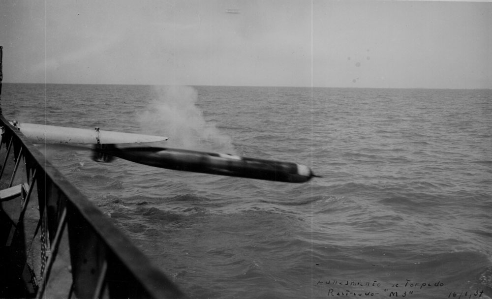 Ejercicio de disparo de torpedos en el rastreador ARA Robinson (M-3)